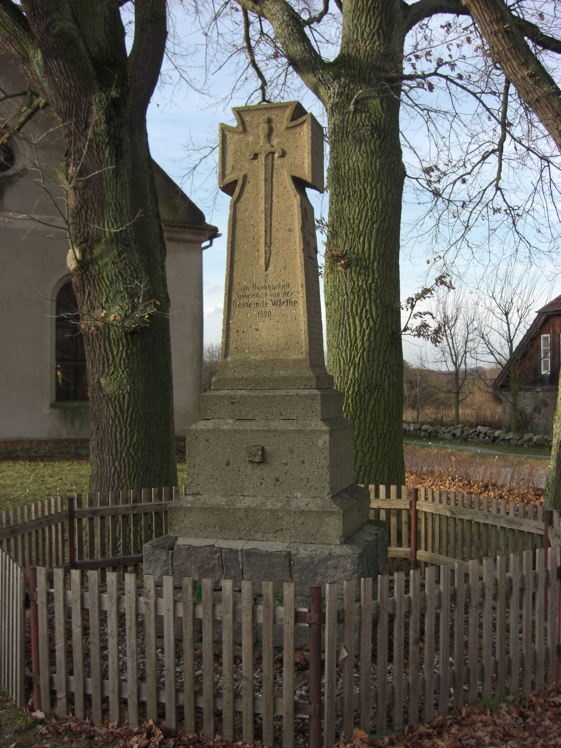 Das Denkmal ehrt die 36 im 1. WK Gefallenen des Dorfes.